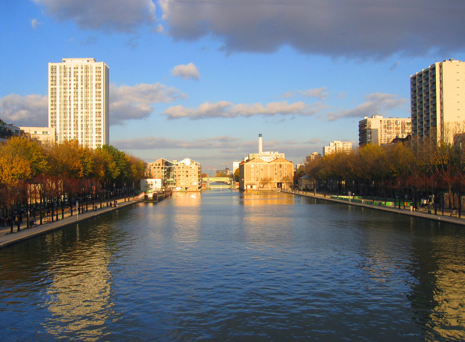 Canal de l'Ourcq, 19. Arrondissement, Paris